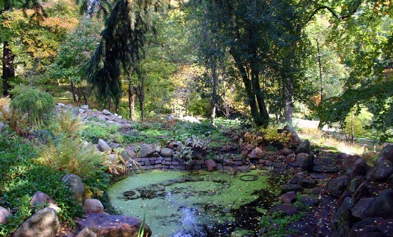 Warszawa (Polska)